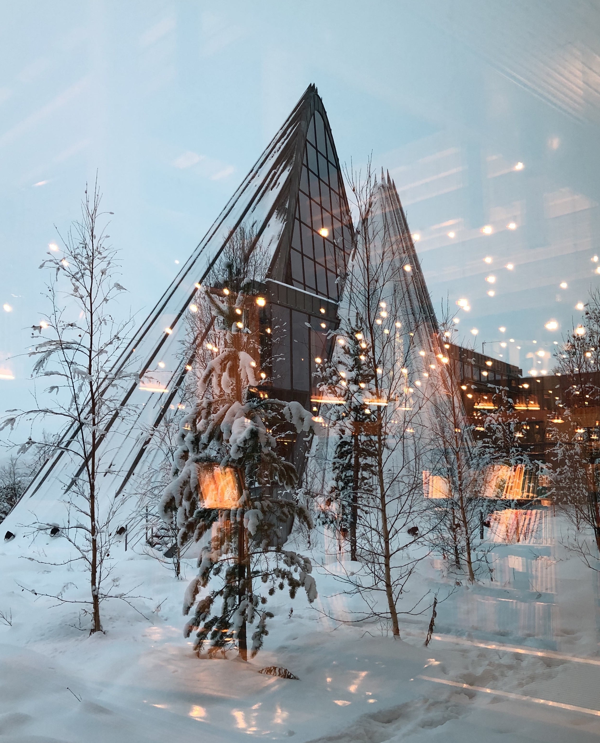 The Sámi Parliament in Norway